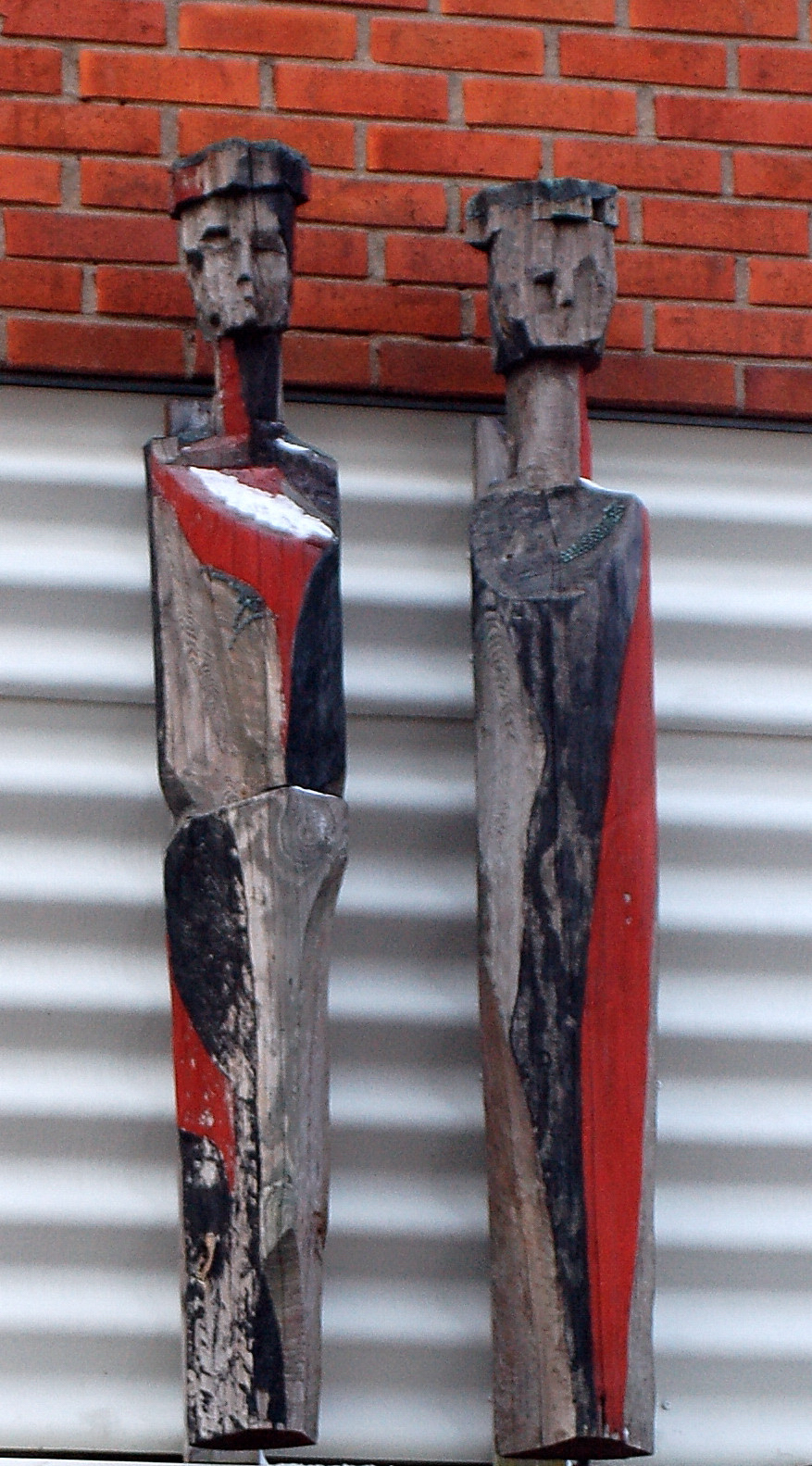 Två Stolpar av Ingemar Lööf, fasadutsmyckning på Hemvägen 3 i Våxnäs, Karlstad.